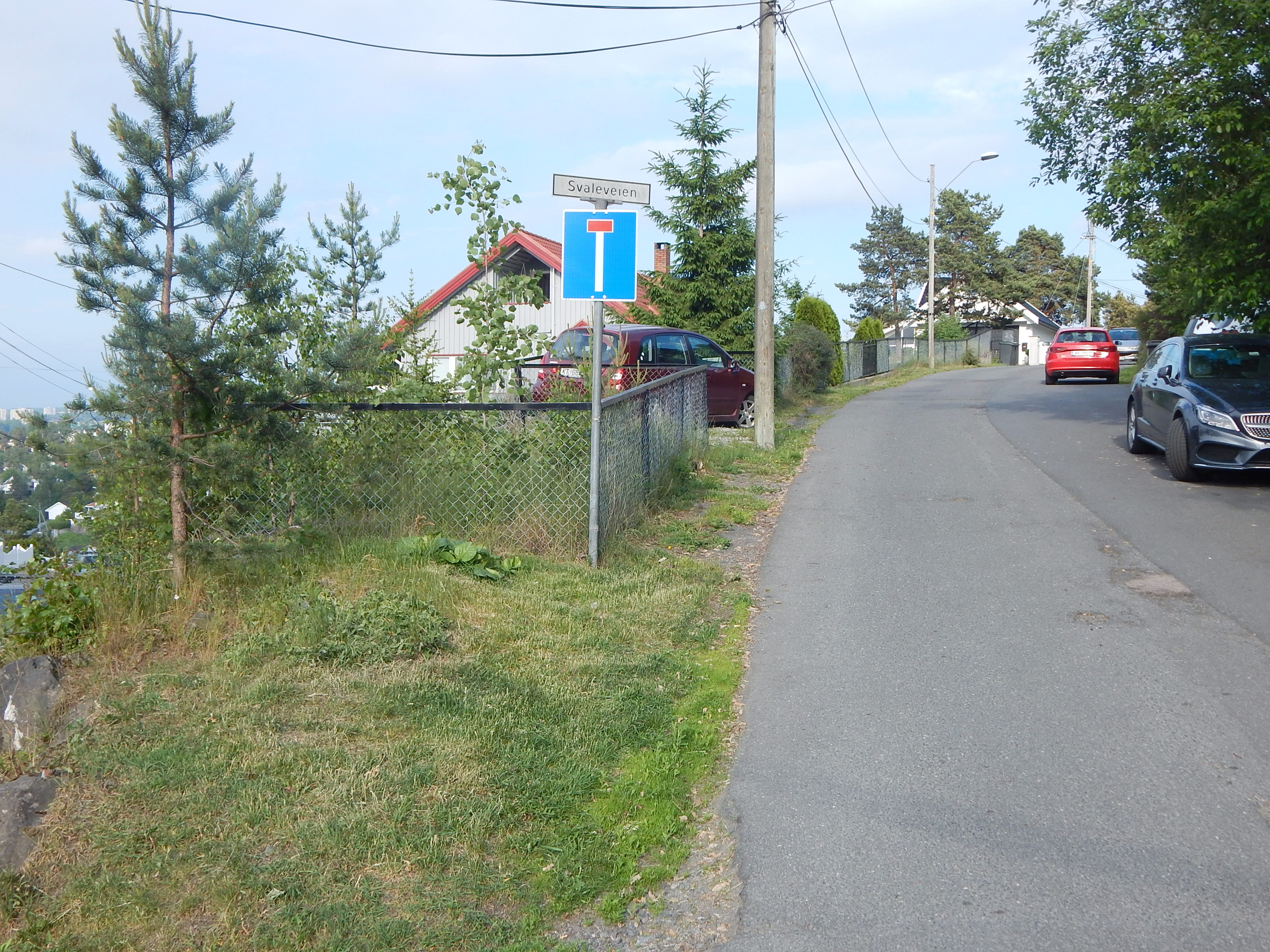 Svaleveien sett fra Simensbråtveien